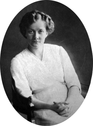 Thora Holm-Lundberg (1881-1970)